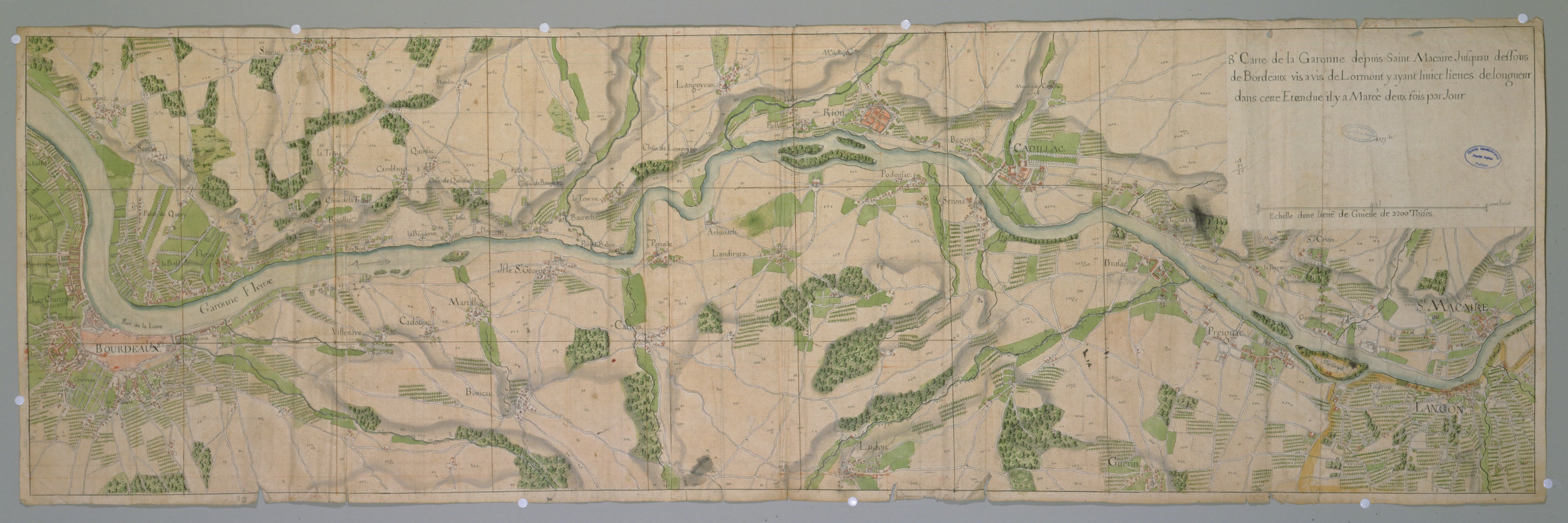 Carte du cours de la Garonne, en 8 feuilles, par Hippolyte Matis De_Saint-Macaire_à_Bordeaux